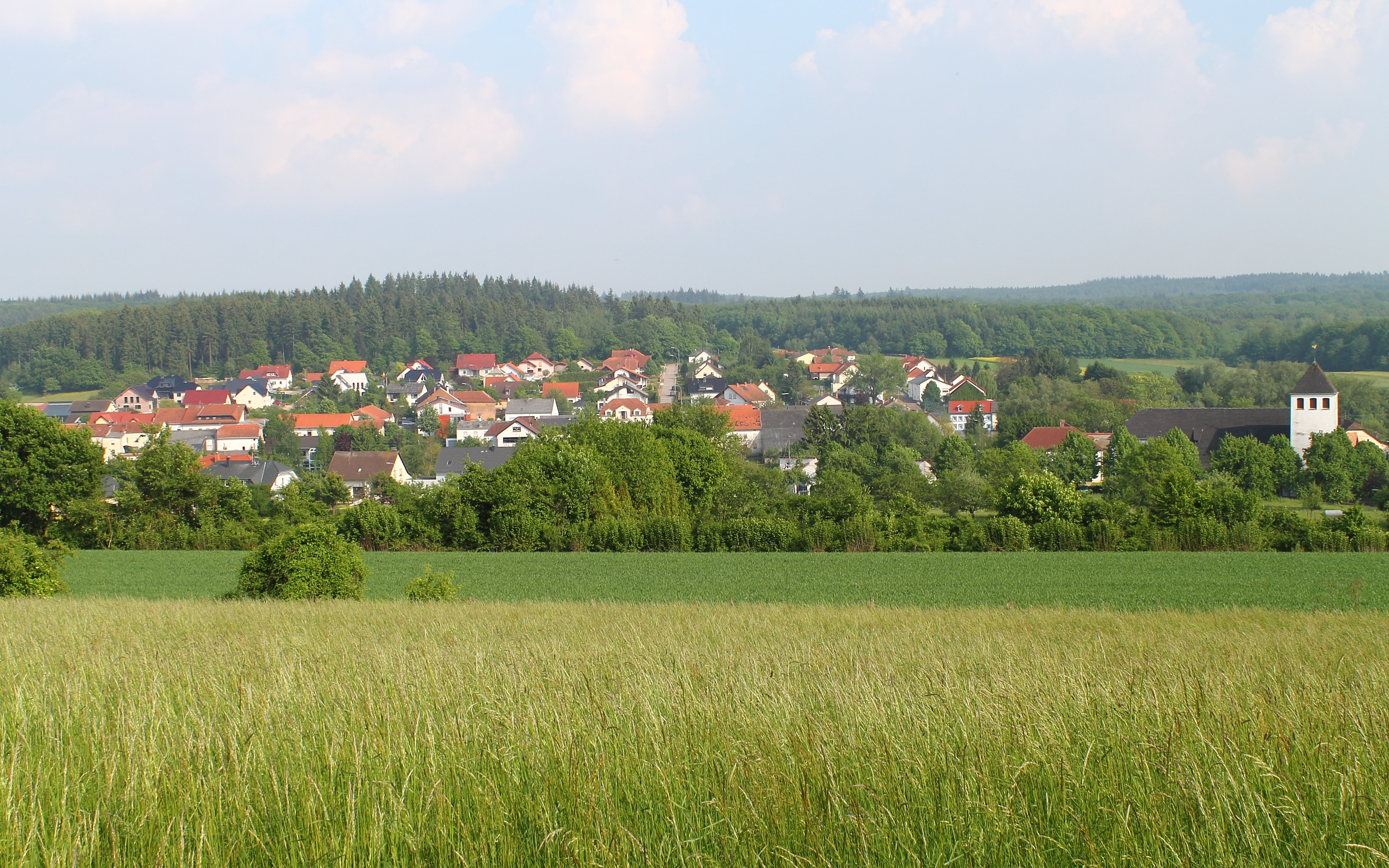 Der Perler Ortsteil Oberleuken